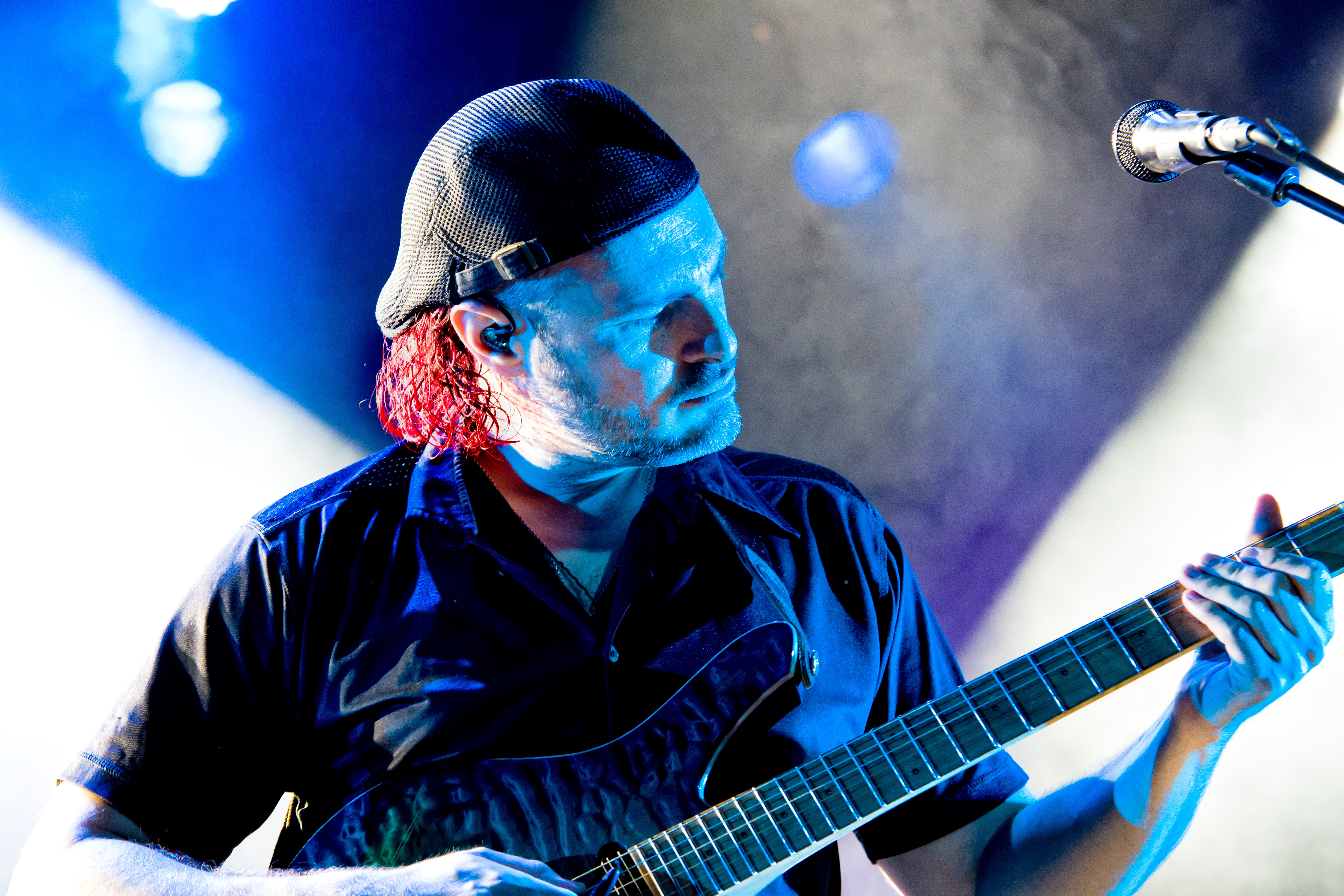 Bilder vom Zelt Musik Festival 2018 in Freiburg im Breisgau Das Eröffnungskonzert mit Steven Wilson